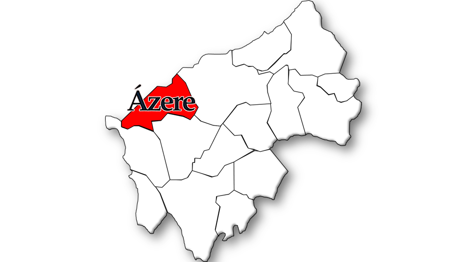 População